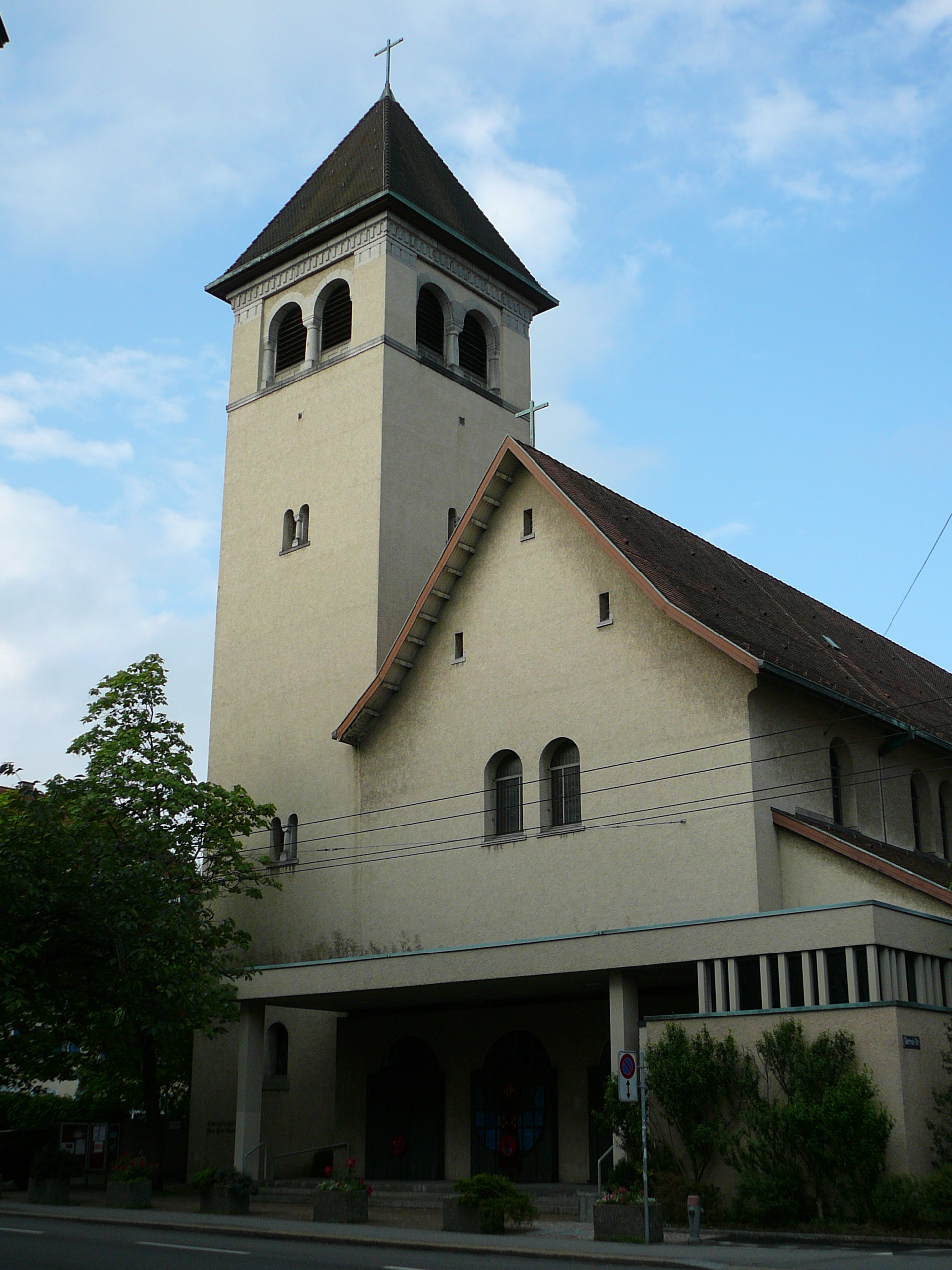 Römisch-katholische Kirche Herz Jesu Zürich-Wiedikon